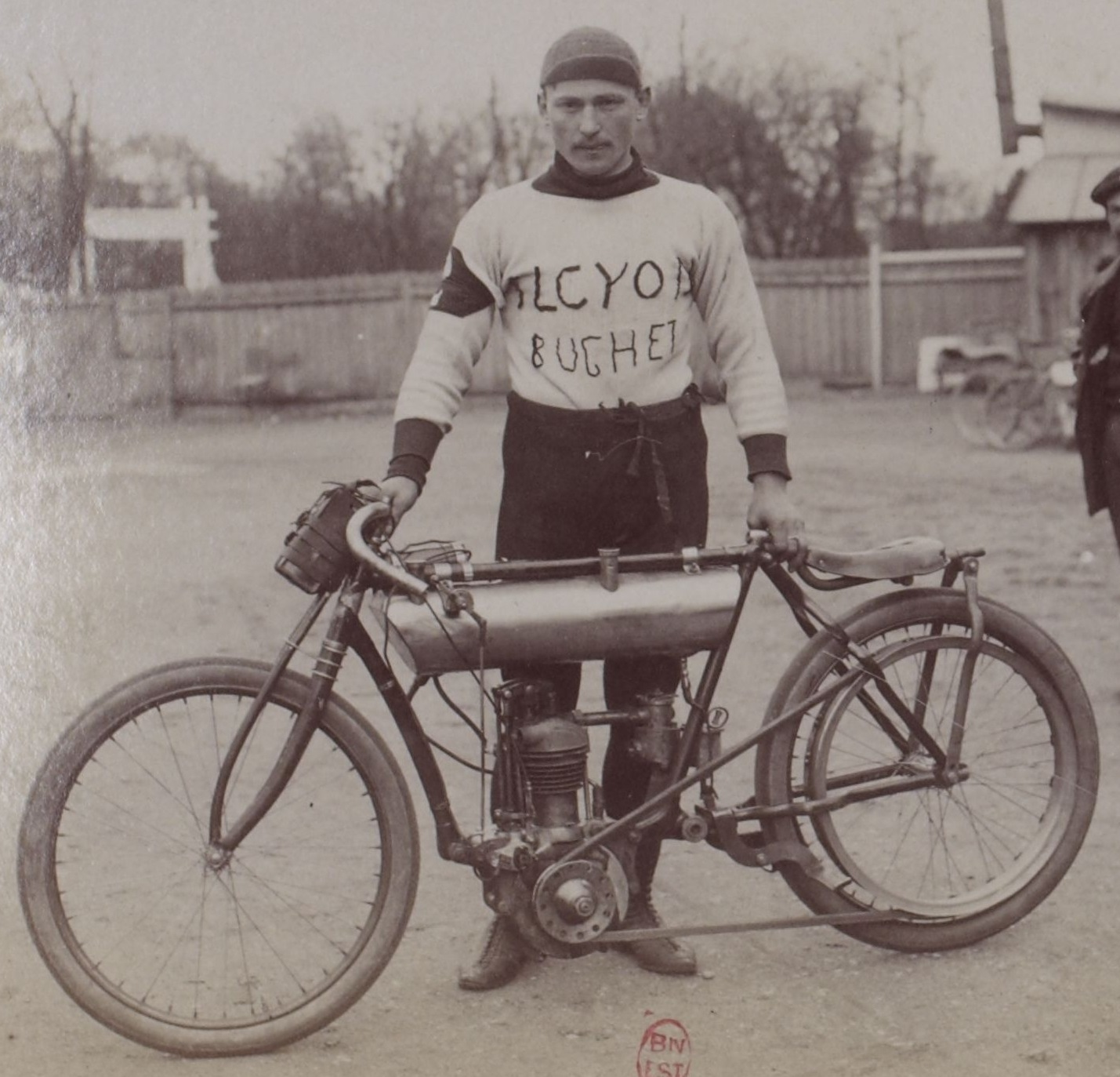 [Collection Jules Beau. Photographie sportive] : T. 29. Année 1905 / Jules Beau : F. 21v. [Coupe Hydra, Parc des Princes, 6 avril 1905]